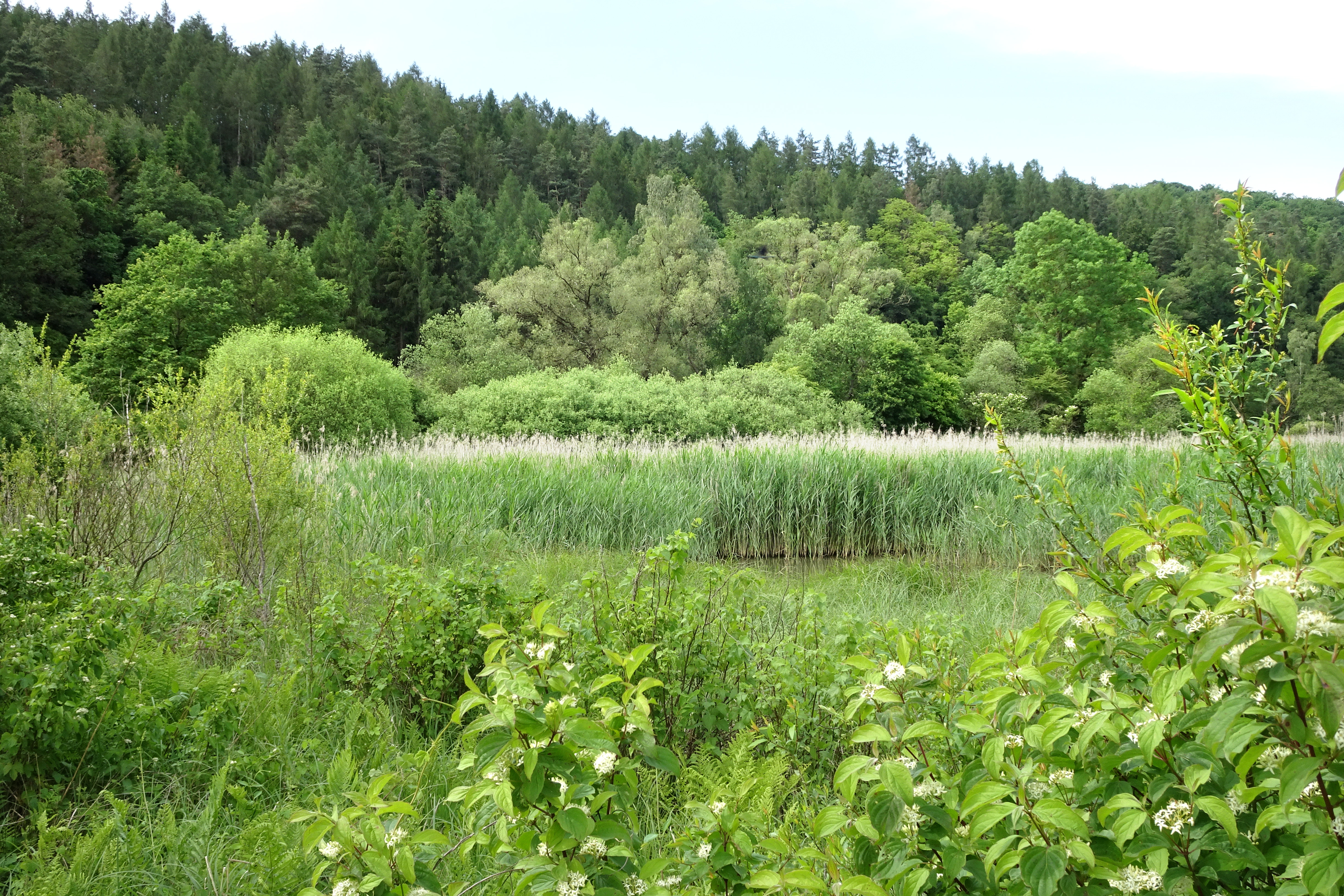 Das Naturschutzgebiet „Unterm Siegel bei Bebra“ liegt im Asmushäuser Grund östlich der B 27 in den Gemarkungen Bebra und Asmushausen der Stadt Bebra im Landkreis Hersfeld-Rotenburg. Es hat eine Größe von rund 8.8 Hektar. Zweck der Ausweisung zum Naturschutzgebiet im Jahr 1983 war es, die ökologisch bedeutsamen und vielgestaltigen brachliegenden Feuchtwiesen sowie einen naturnahen Abschnitt des Bebrabaches als Lebensraum bedrohter Tier- und Pflanzenarten zu sichern und zu erhalten.